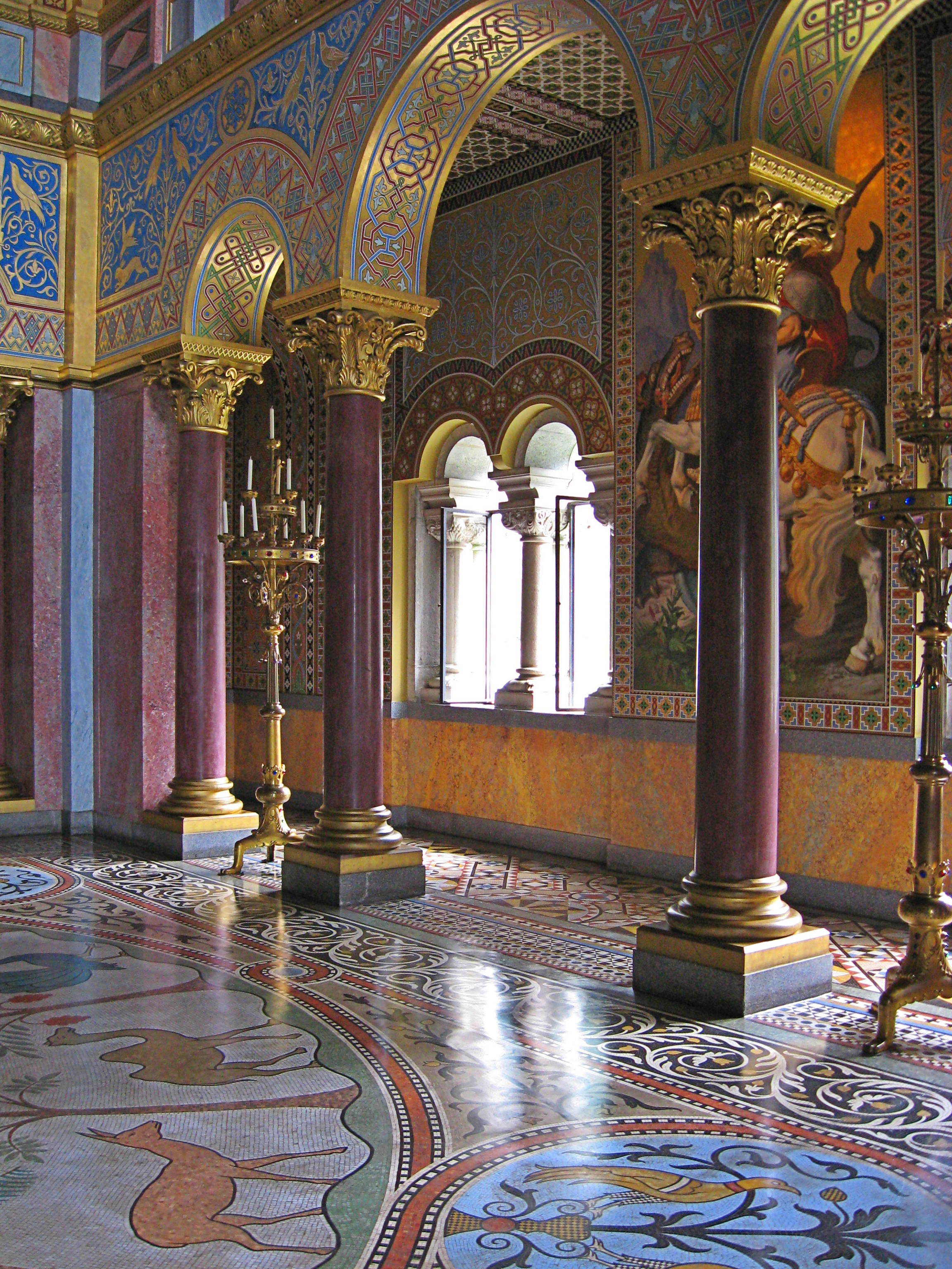 Neuschwanstein Throne Sall